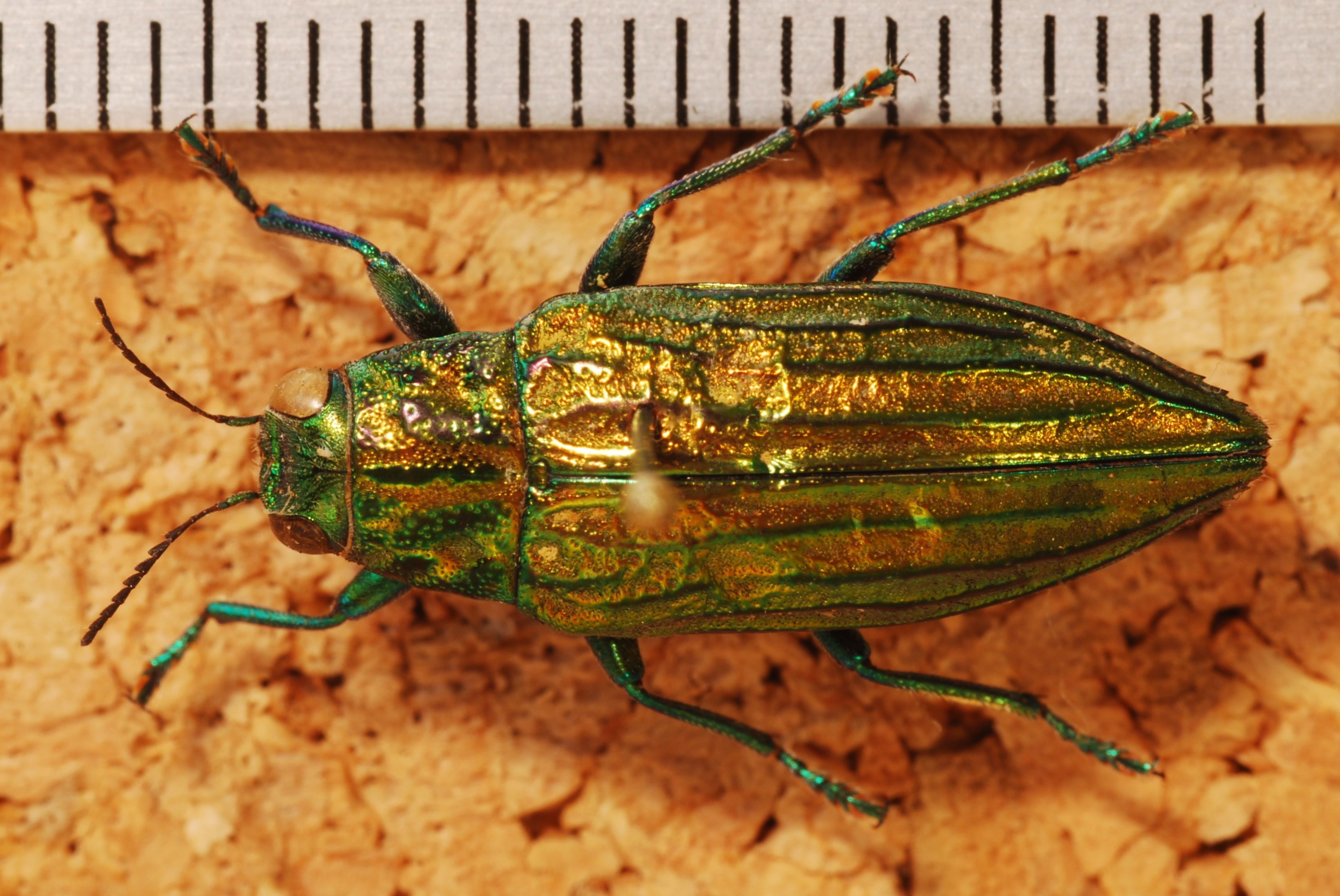 Dinagat Island, PHILIPPINES